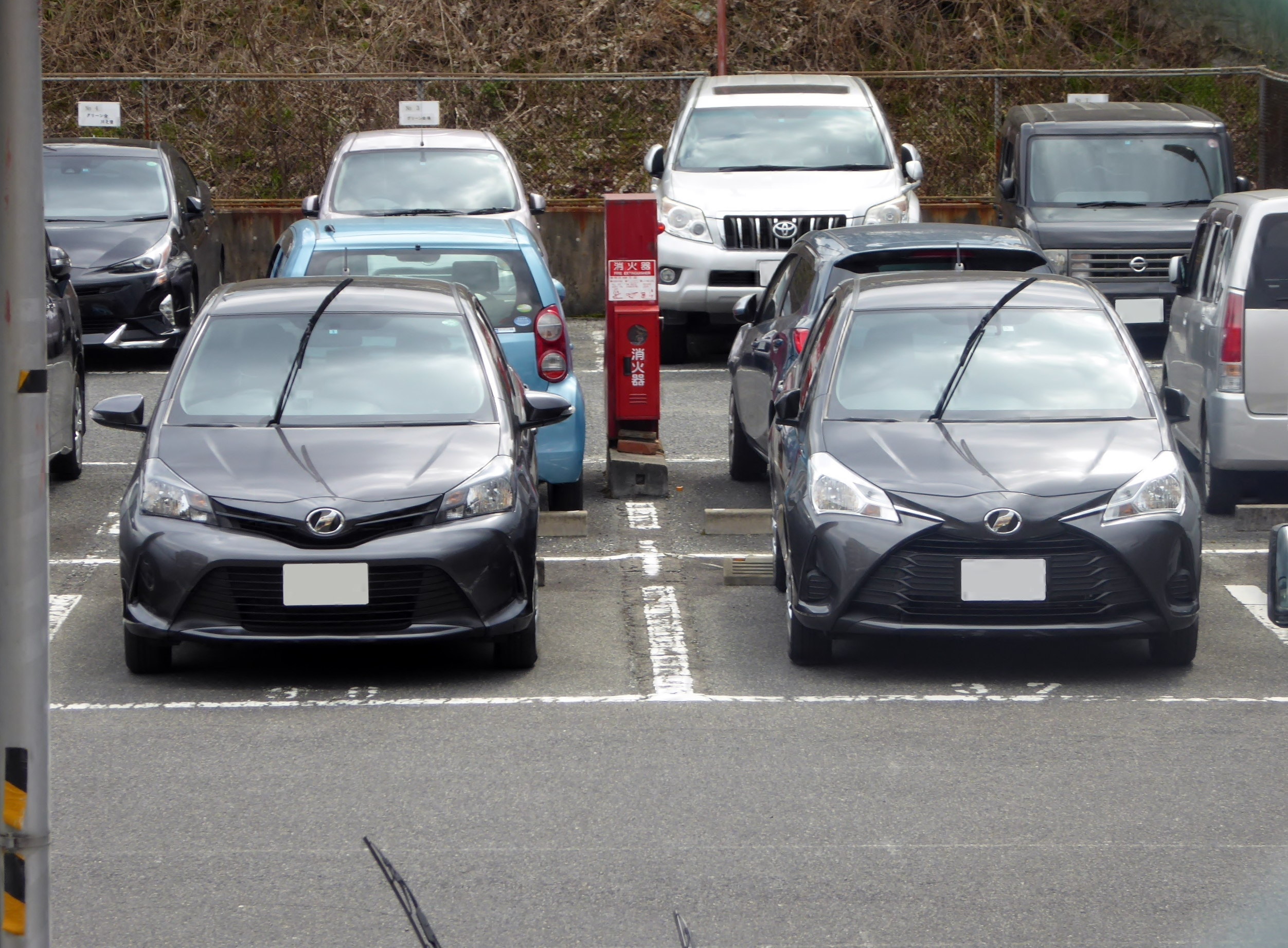 XP150型トヨタ・ヴィッツの中期型と後期型を撮影。